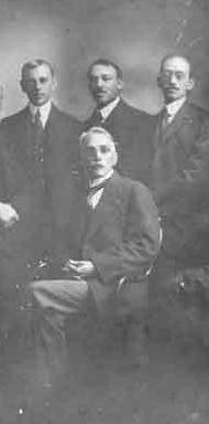 Miguel García Sierra Gobernardor del Valle(el primero de pie de izquierda a derecha), Manuel María Buenaventura y Ricardo Nieto. Foto publicada el 1 de enero de 1900.